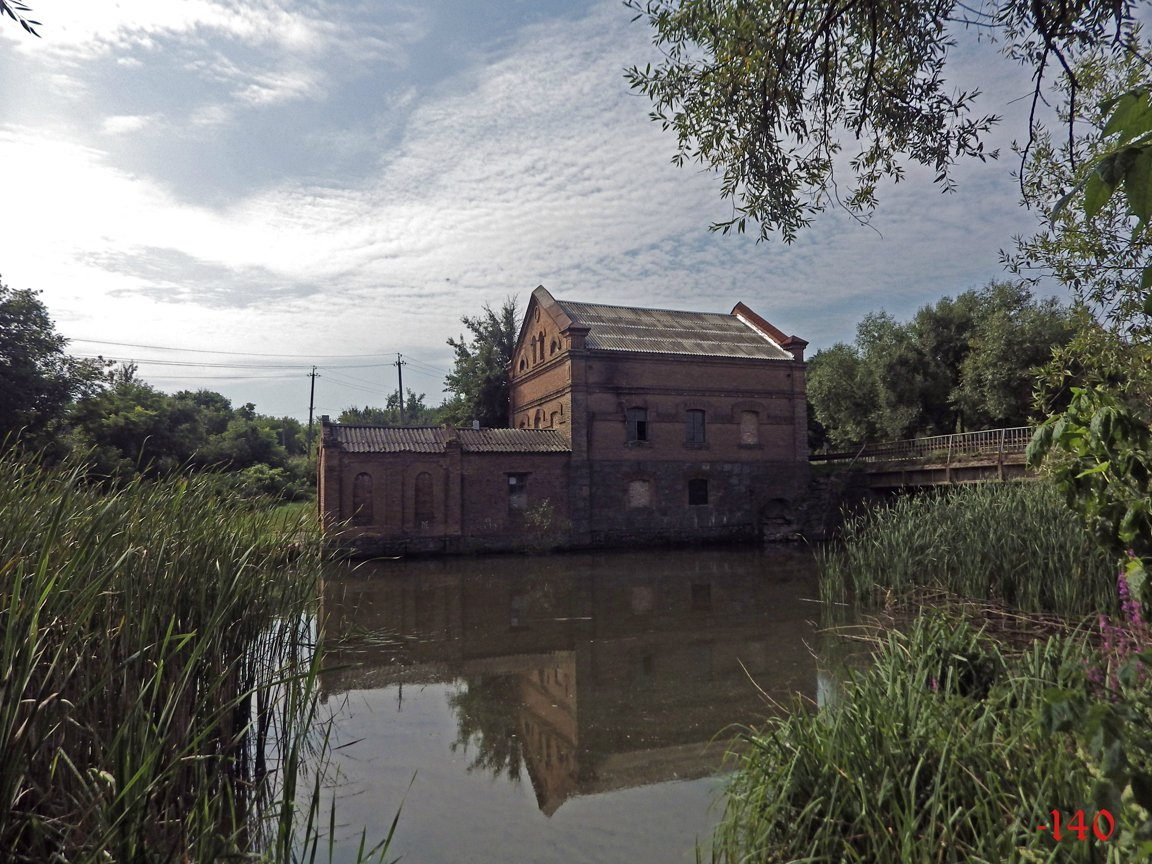 Водяний млин (мур.), село Антонів